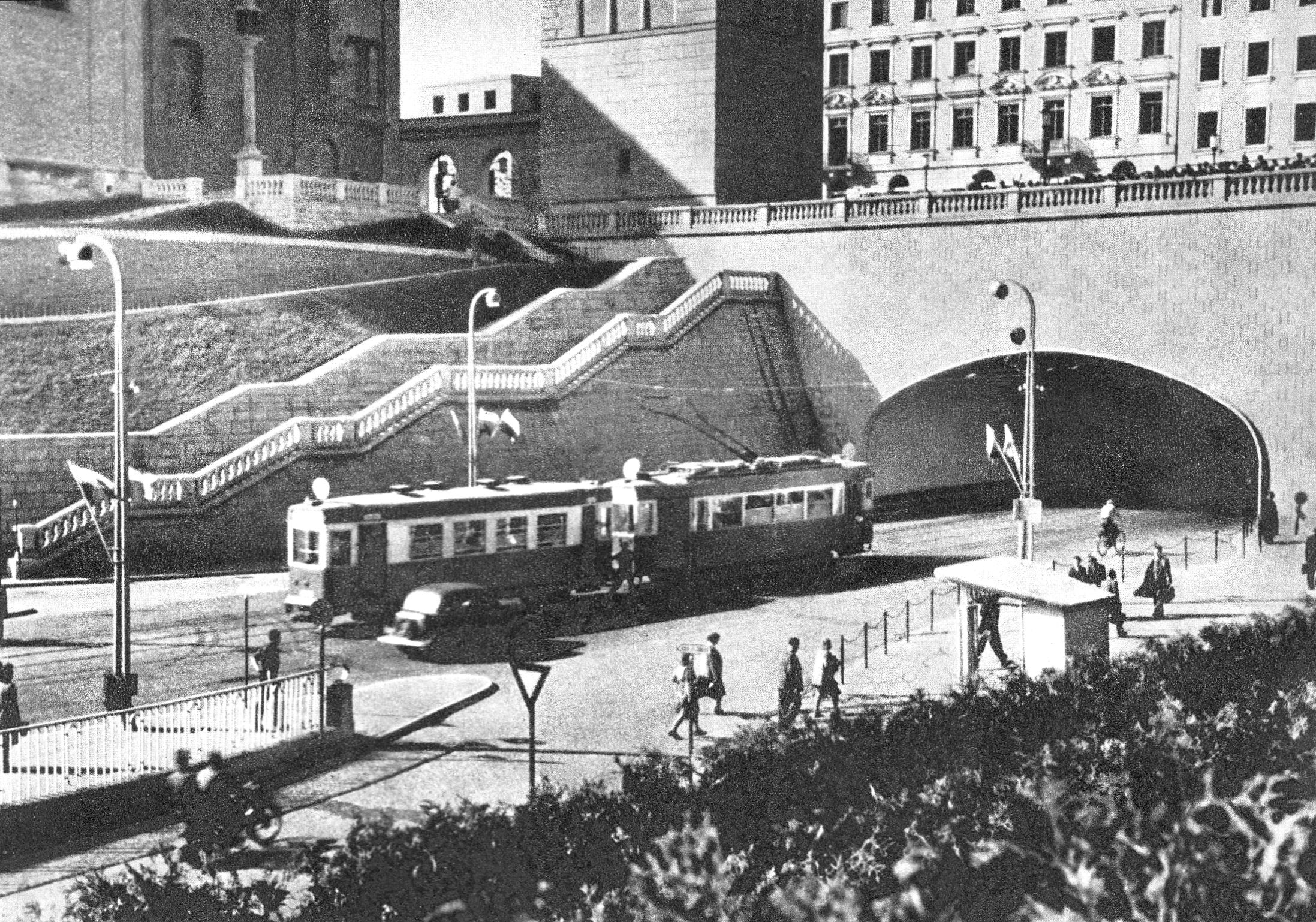 Wjazd do tunelu Trasy W-Z w Warszawie